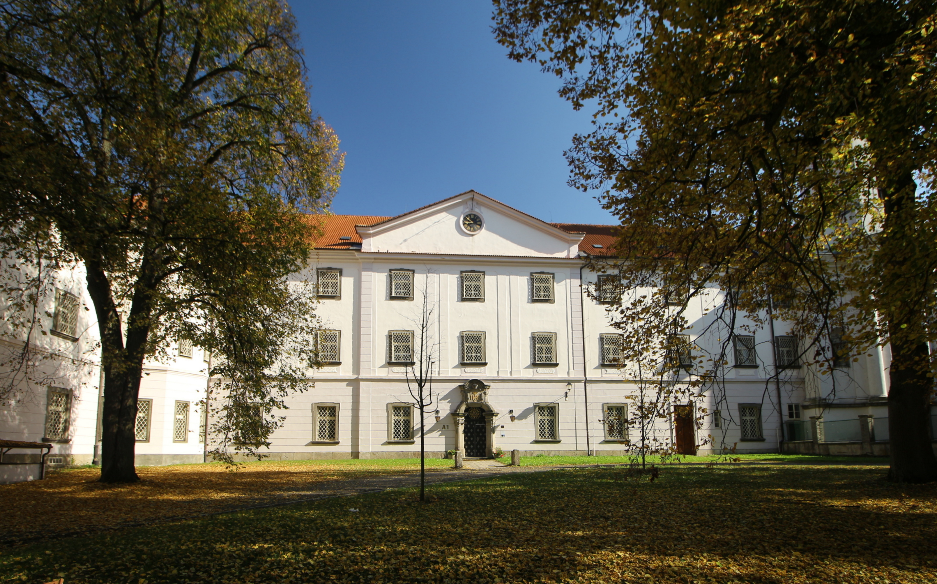 Opařany, okres Tábor